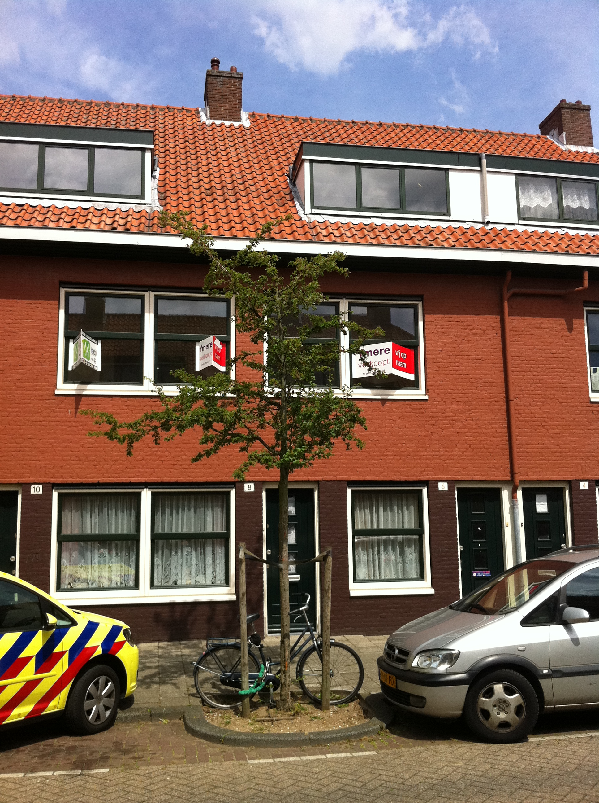 Fresiastraat Bloemenbuurt Amsterdam-Noord, woningen gebouwd door Zomers Buiten, nu verhuurd door woningcorporatie Ymere